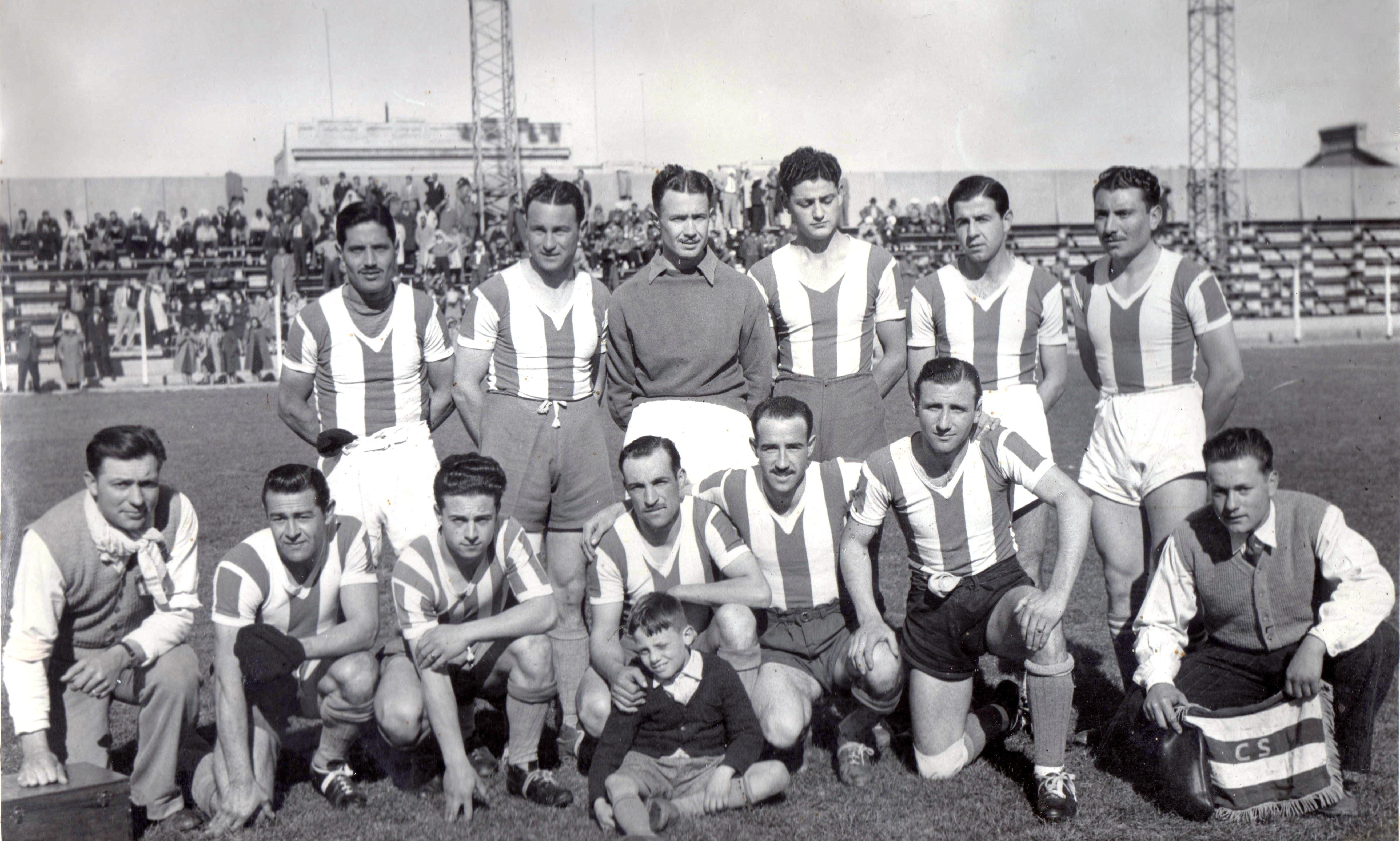 Equipo de Sansinena Campeón en 1947